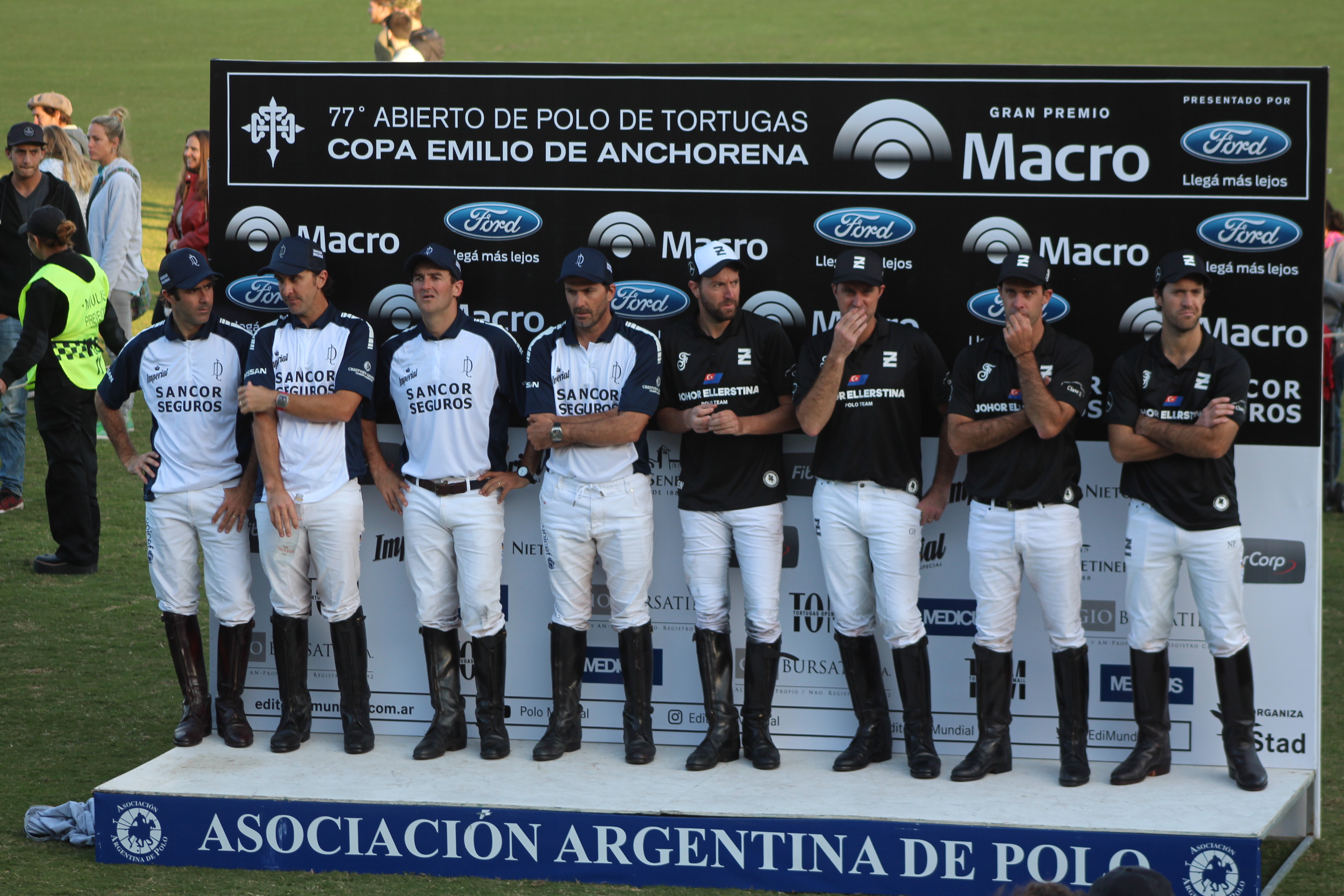 Ellerstina - Club De Poli